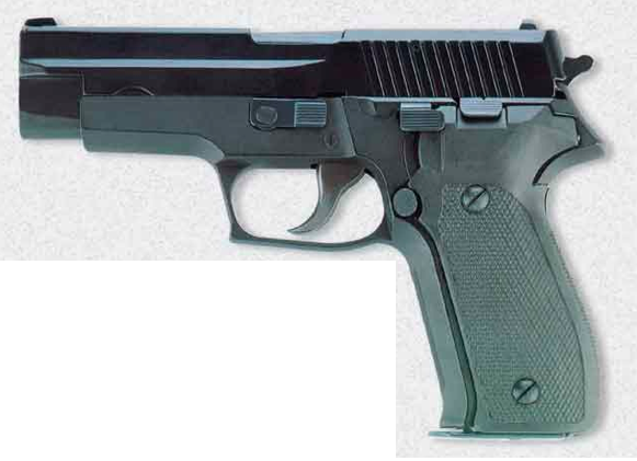 تفنگ دستی ساخت ایران